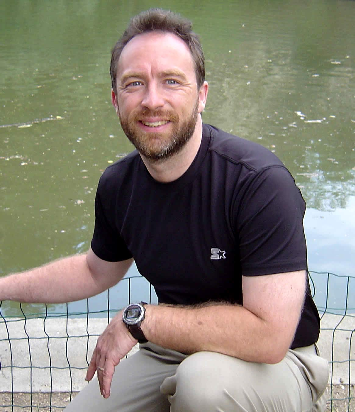 Jimbo Wales at "Parc des Buttes Chaumont", a park in Paris not far from Gare du Nord.